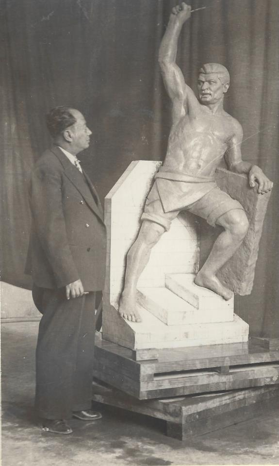 El gobernador interino Rafael Rangel Hurtado (1937-1938) con la maqueta de lo que iba a ser el monumento al Pípila